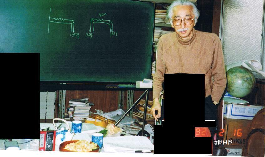 土師さんの自宅離れにて。